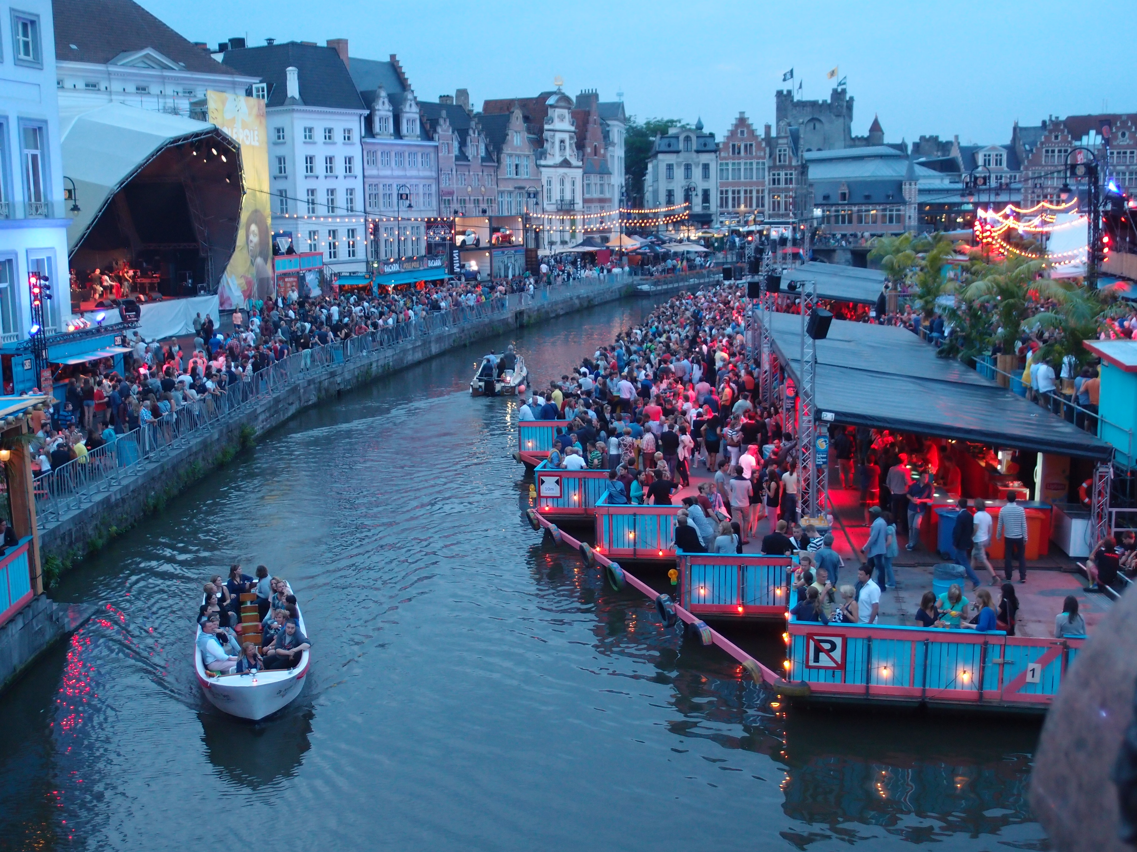 Gentse Feesten 2014 - mit Blick auf die Haupttribüne Datum: 25.07.2014 Urheber: M. Pfeiffer alias Benutzer:Gordito1869 Quelle: Privates Fotoarchiv des Urhebers